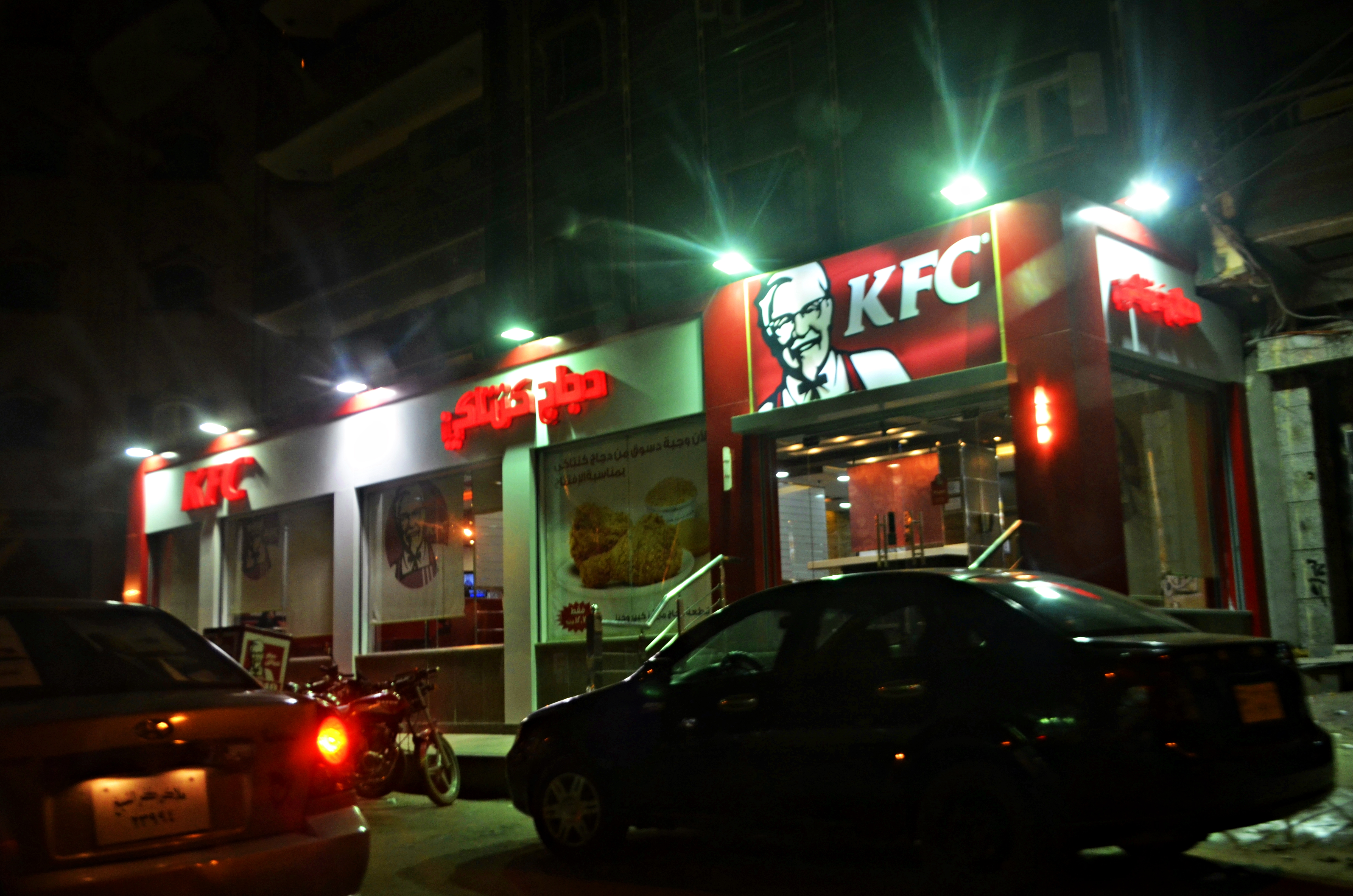 دجاج كنتاكي، دسوق